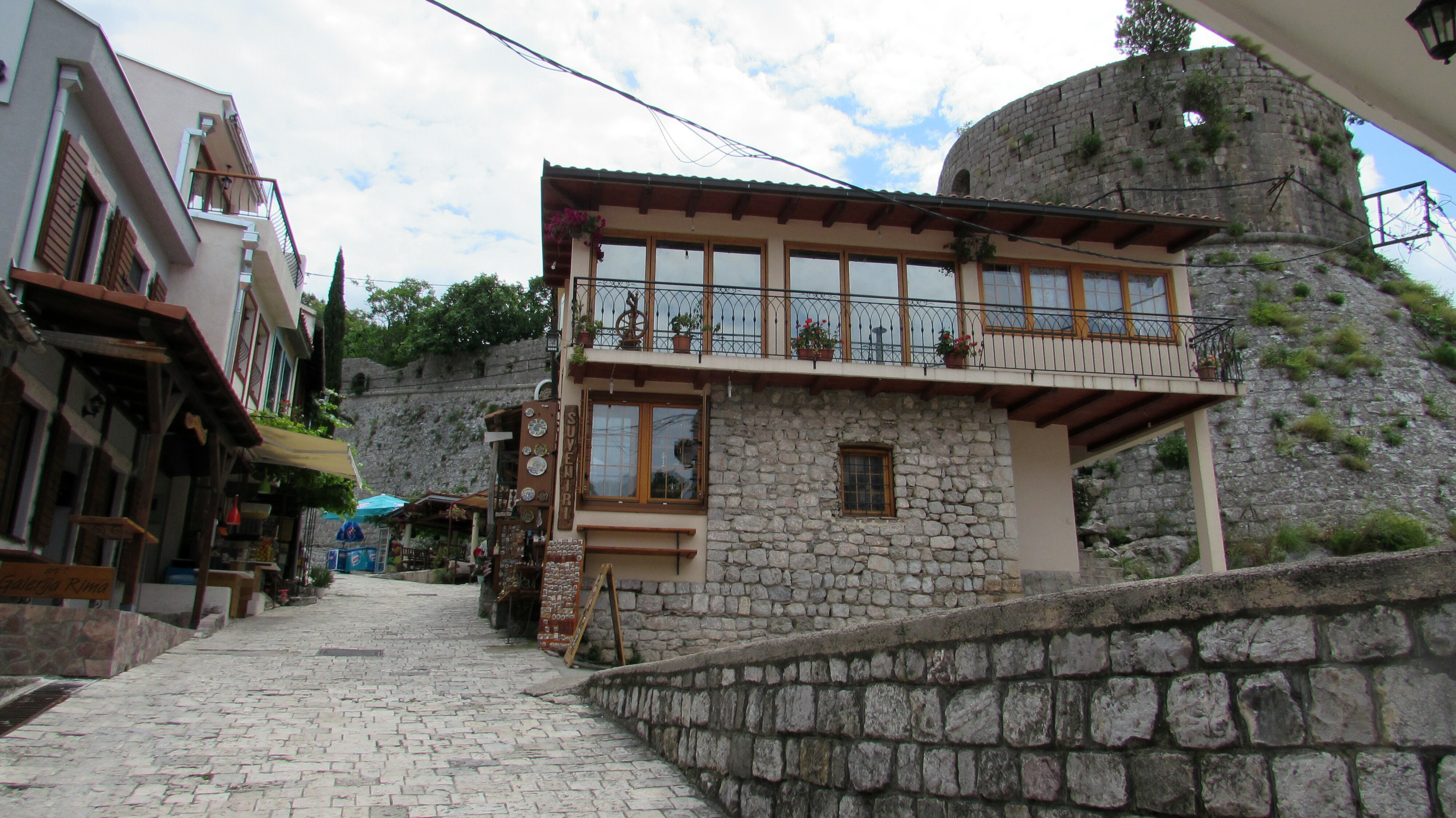 StariBarAnsicht2014